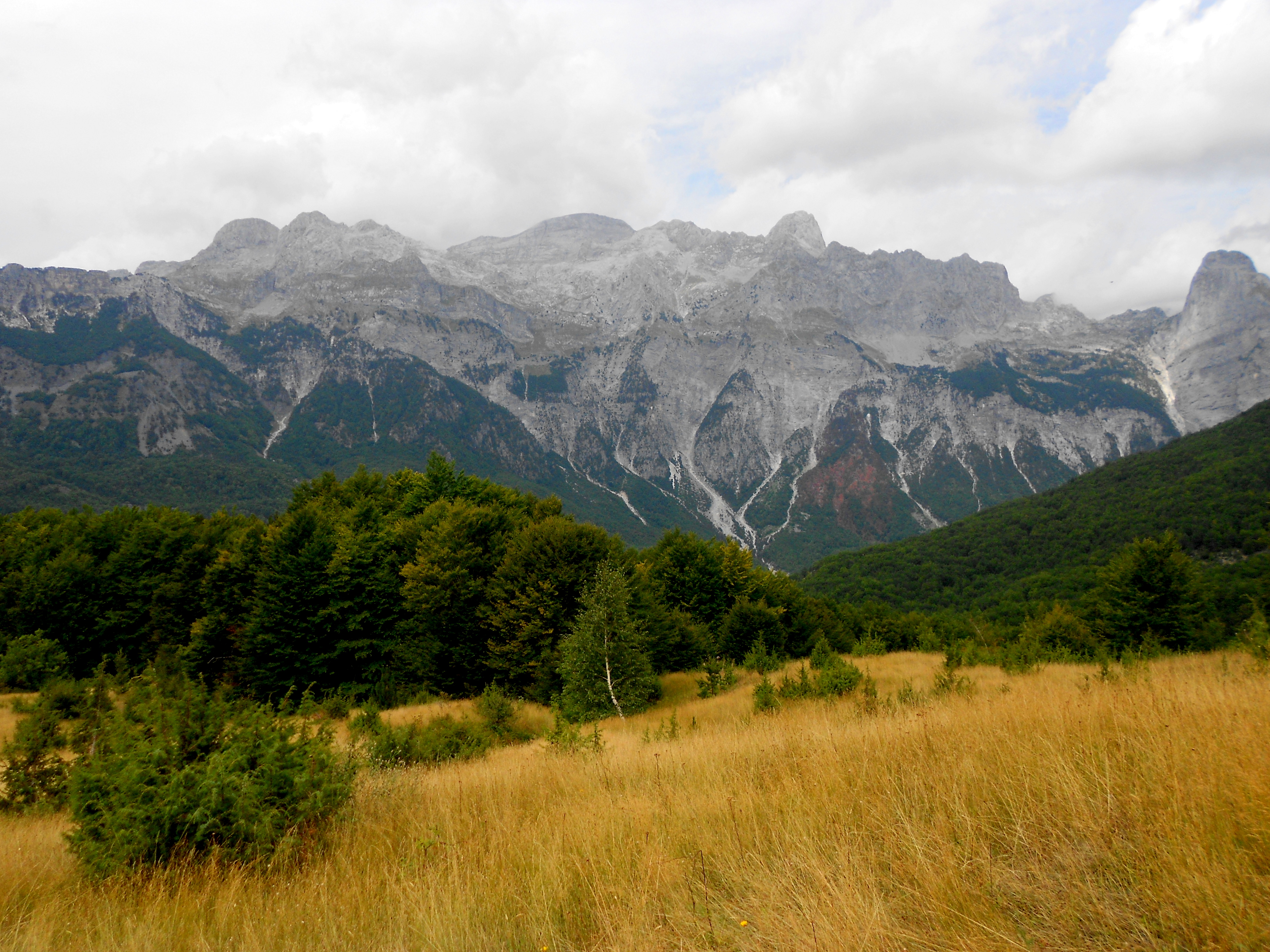 Thethi, Shkoder